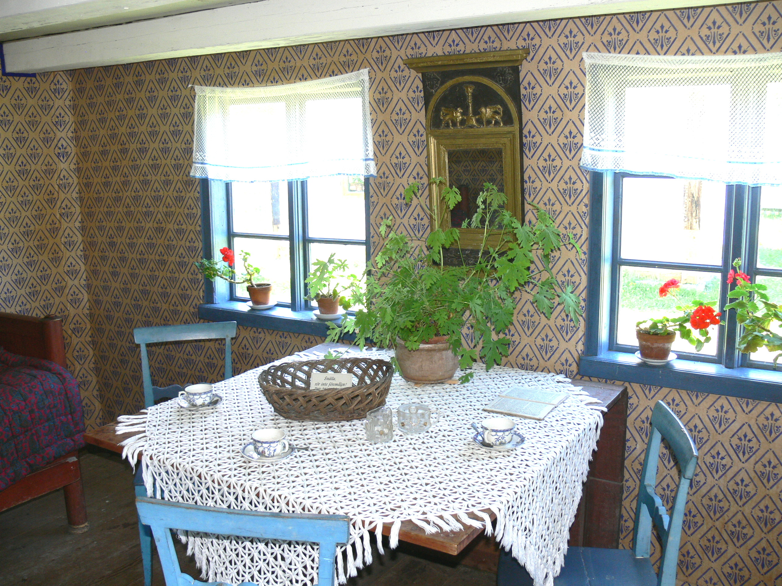 Bunge Museum auf Gotland. Hof ( 19.Jhdt. ): Wohnzimmer